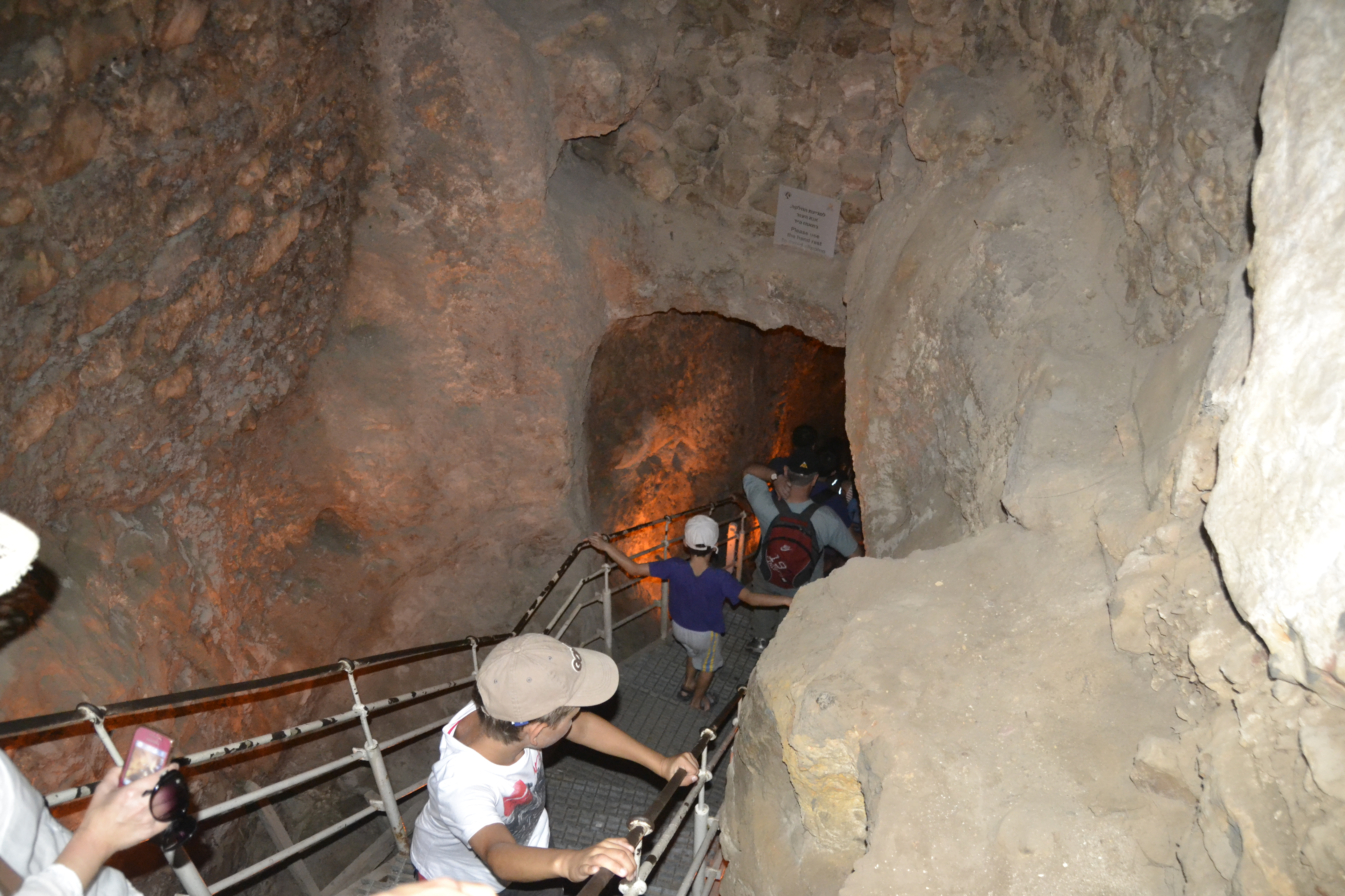 יורדים מטה למעיין הגיחון